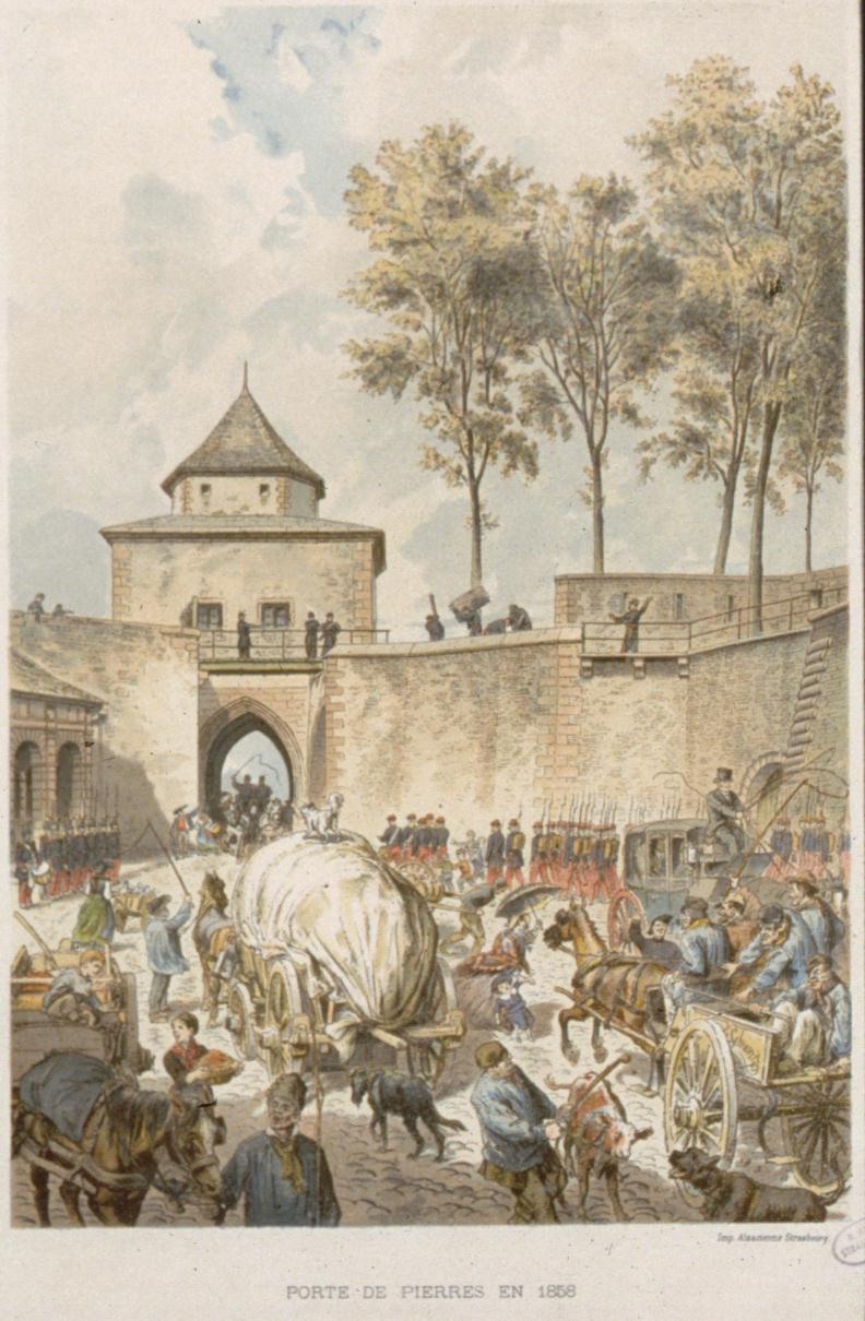 représentation de la Porte de Pierre (Steintor) à Strasbourg en 1858